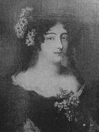 Melusine von der Schulenburg, Anonymous Print British Museum, London